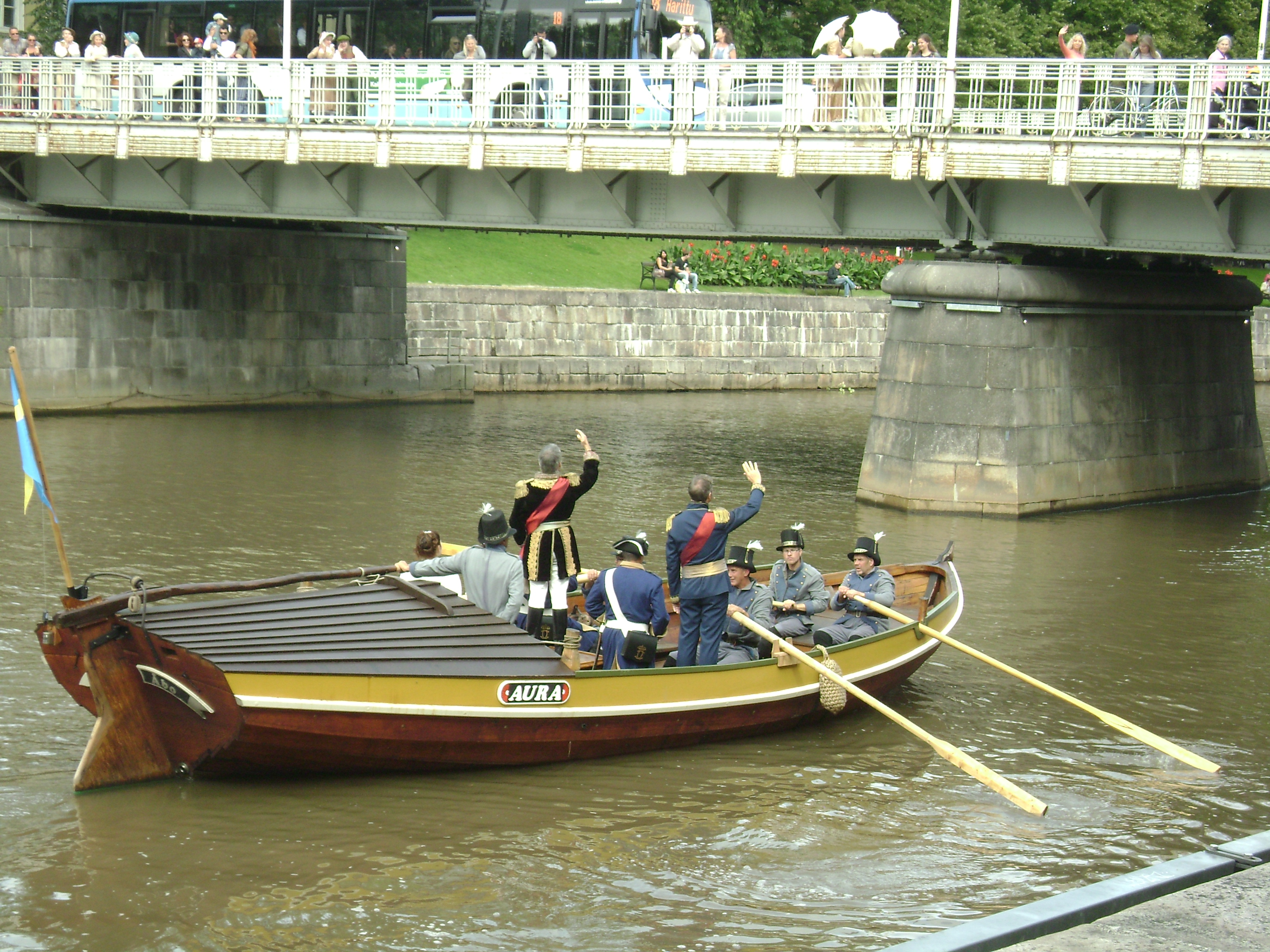 Näytelmän ”Vallan valoja 1812” esinäytös jossa näyttelijät saapuvat laivalla Vähätorille. Lisätietoja tapahtumasta löytyy 1812 juhlavuoden kalenterista ja lisätietoja veneestä löytyy Turunmaan perinneveneyhdistyksen kotisivuilta.